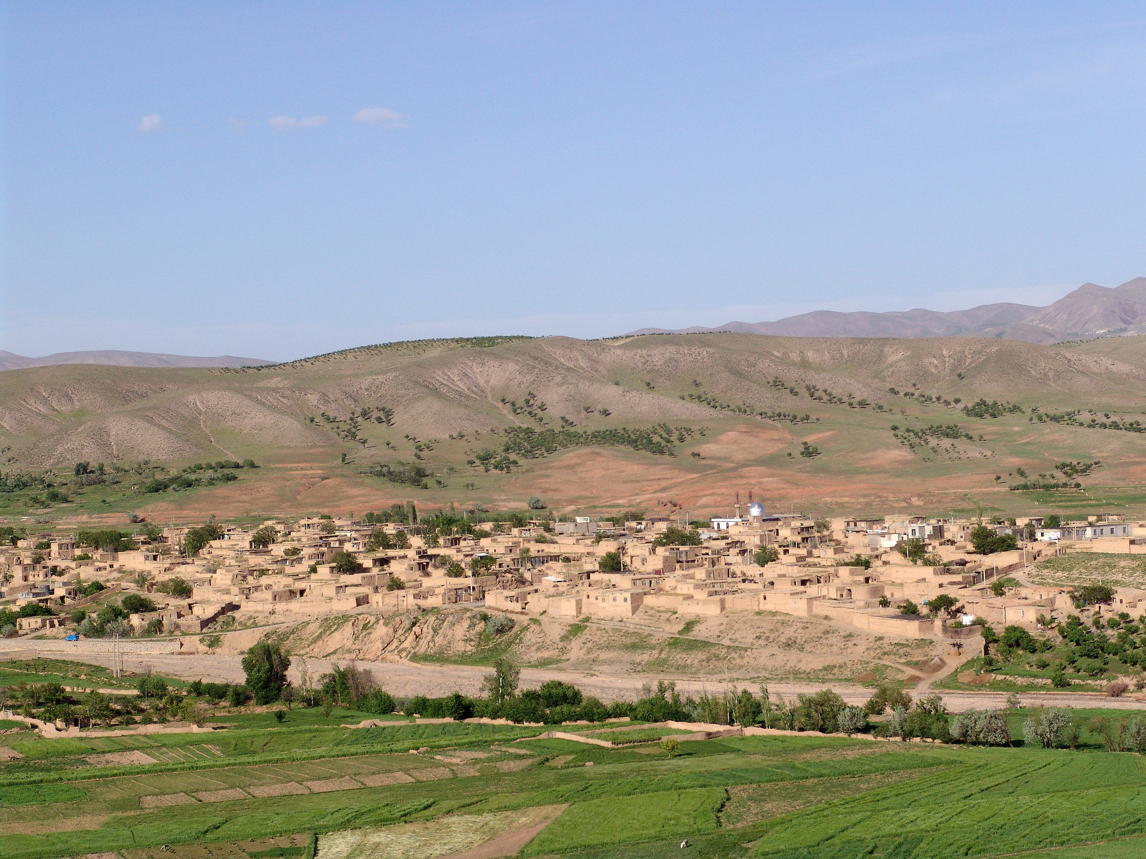 دورنمایی از روستای بام ،1390